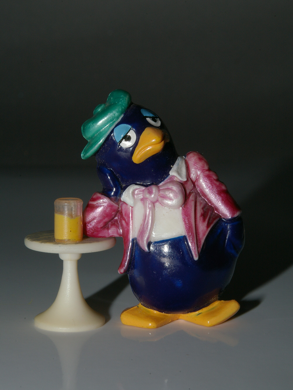 Harte Ausleuchtung einer Nahaufnahme mit direktem,kamerainternem Blitz